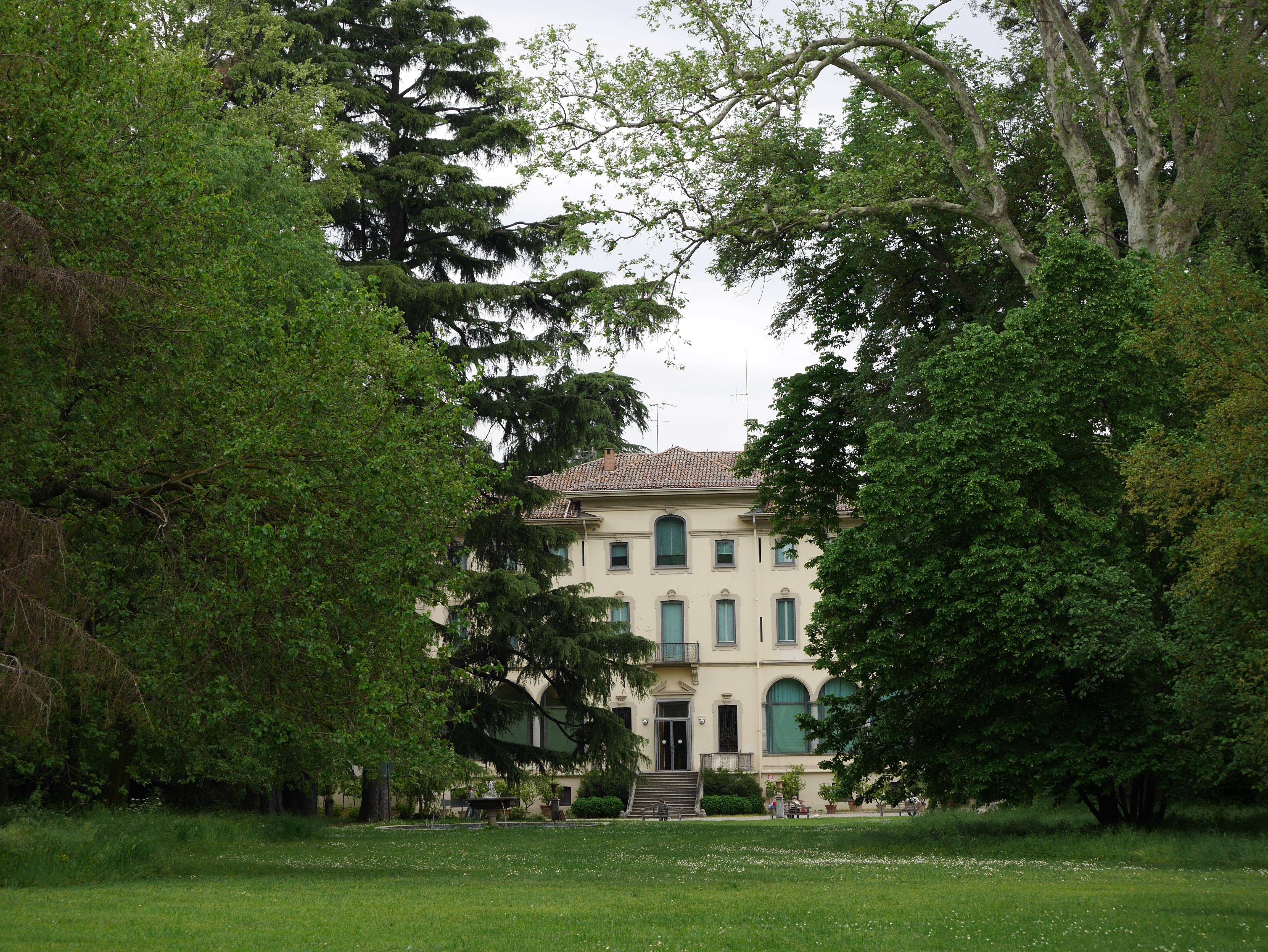 platano comune This is a photo of a monument which is part of cultural heritage of Italy.